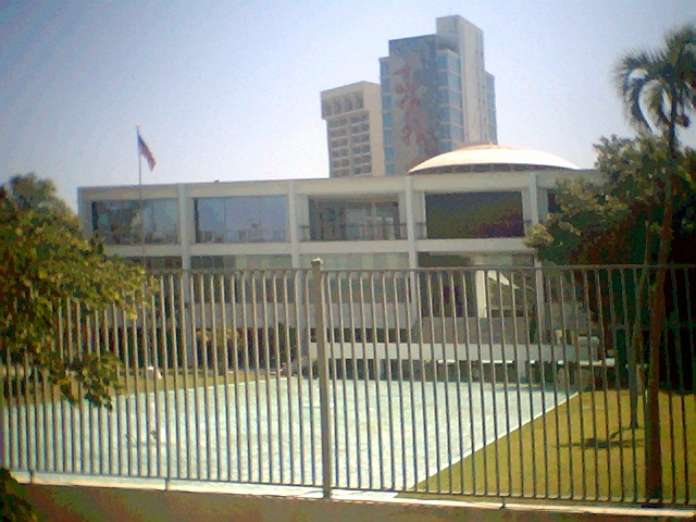 Edificio del Tribunal Supremo de Puerto Rico Foto por: Carlos Saavedra 6 de marzo de 2006